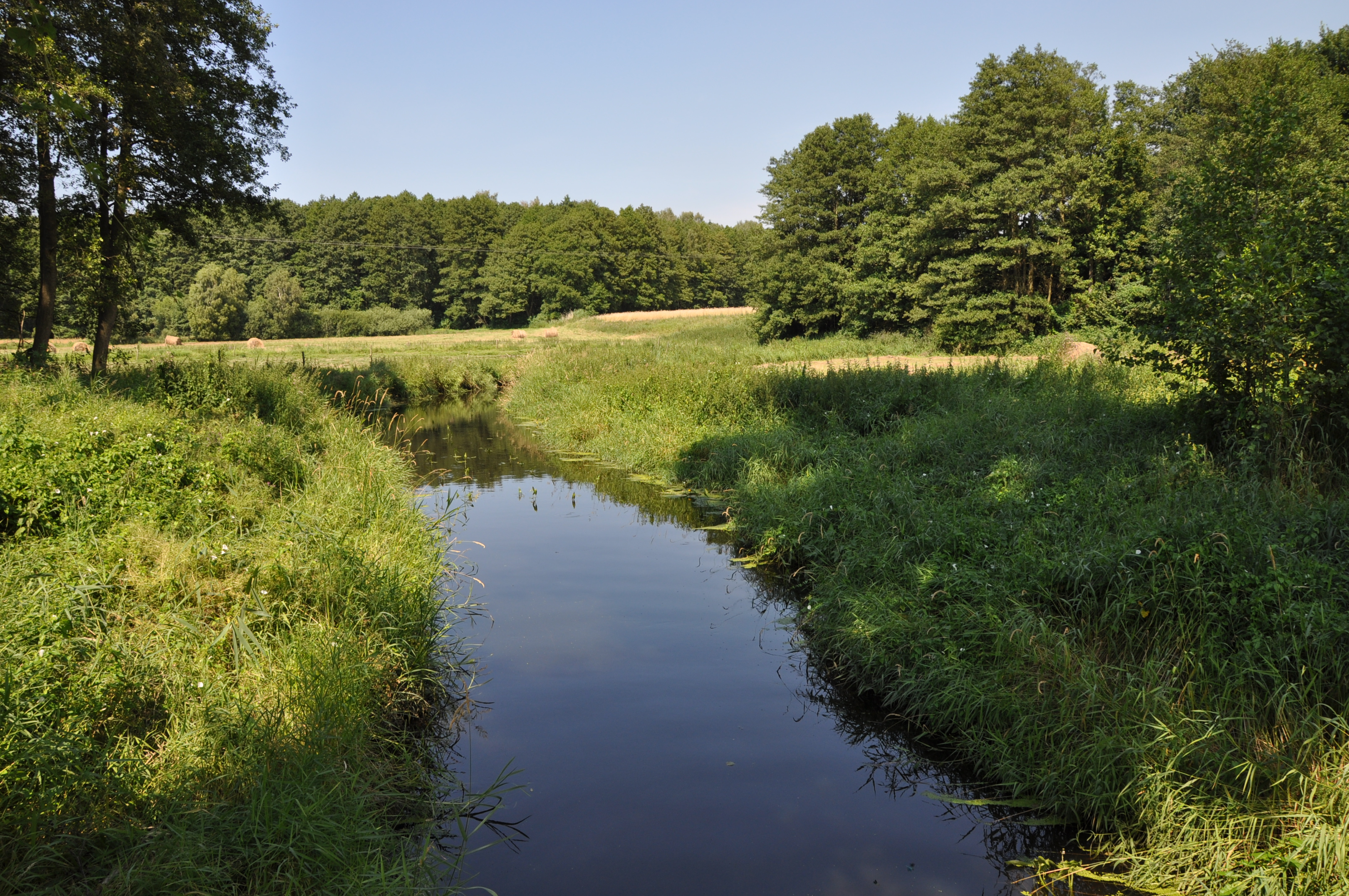 Rzeka Niemica z mostu w Mokrawicy – ujęcie w kierunku północnym